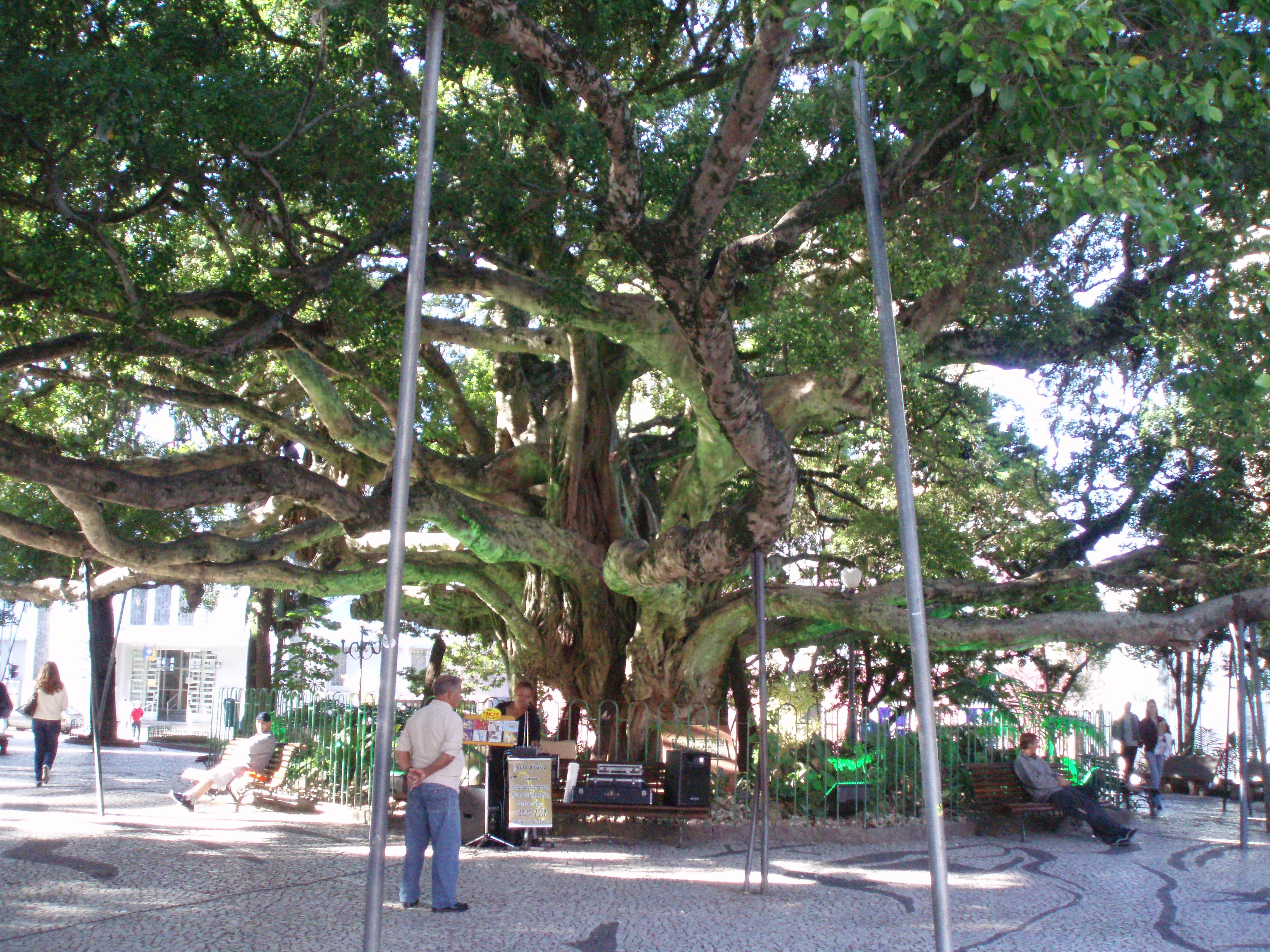 Le figuier centenaire de la place centrale de Florianopolis, Brésil